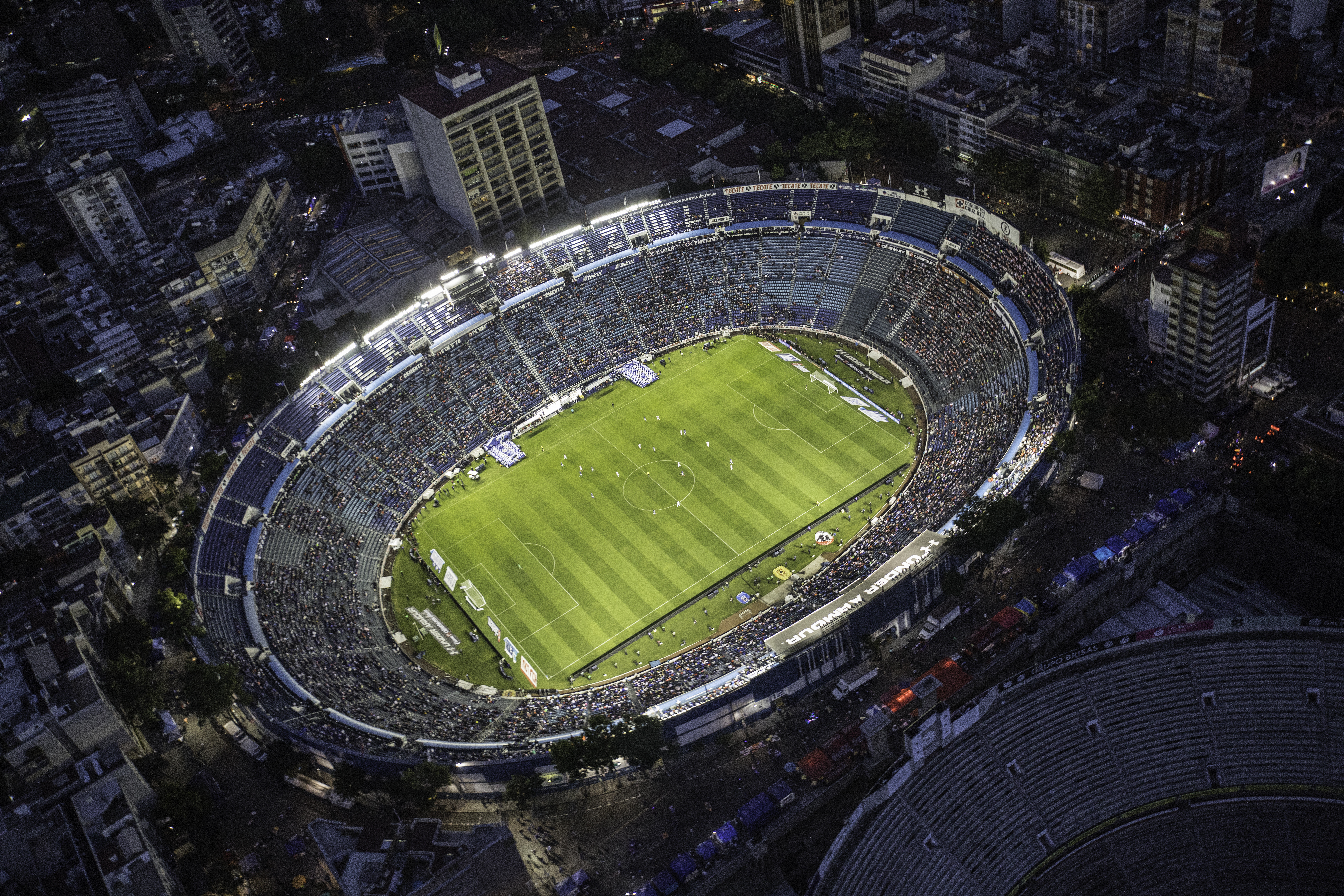 Fotografías de la Ciudad de México desde el aire.